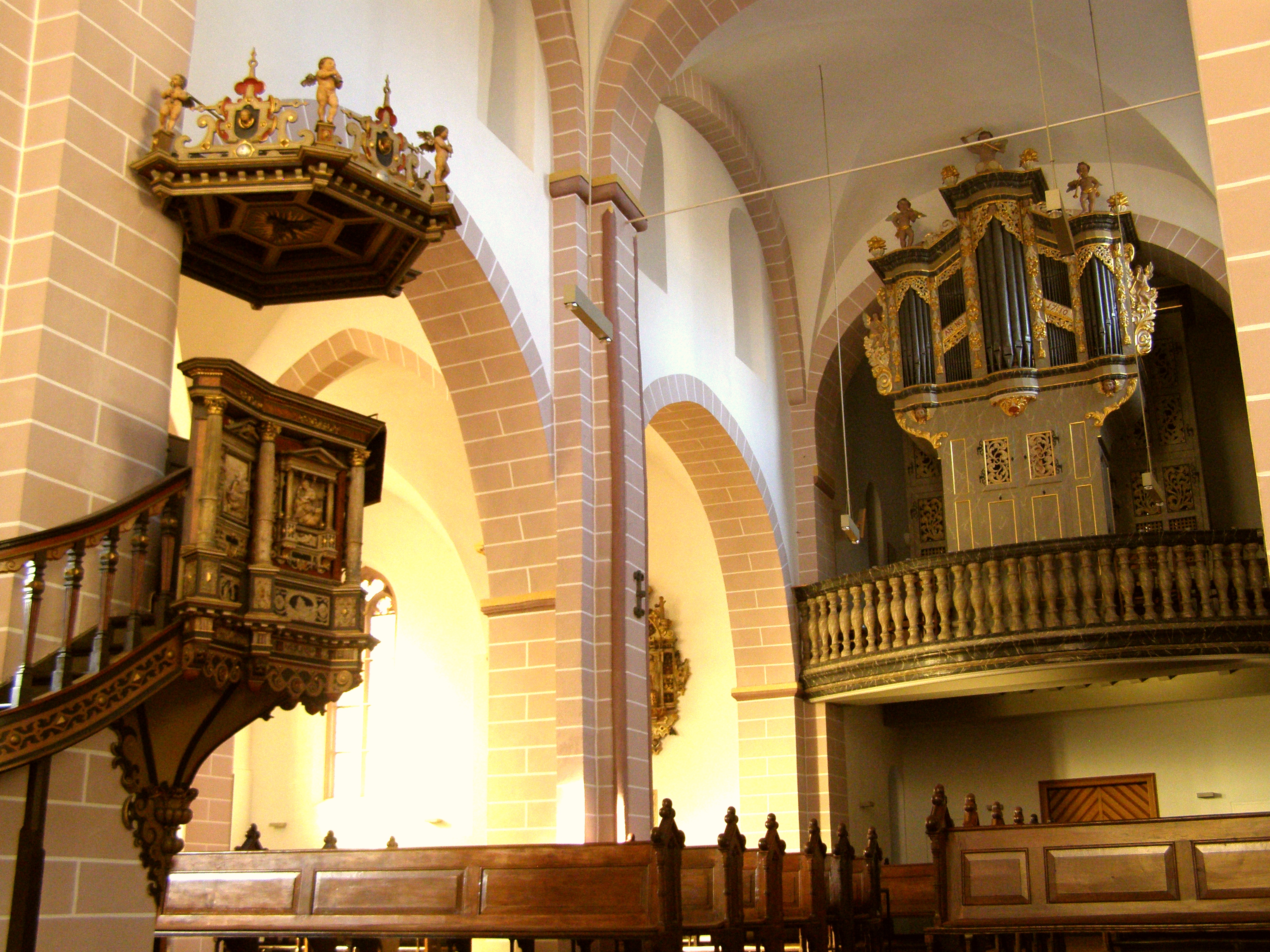 Kanzel und Orgel der Kilianikirche Höxter